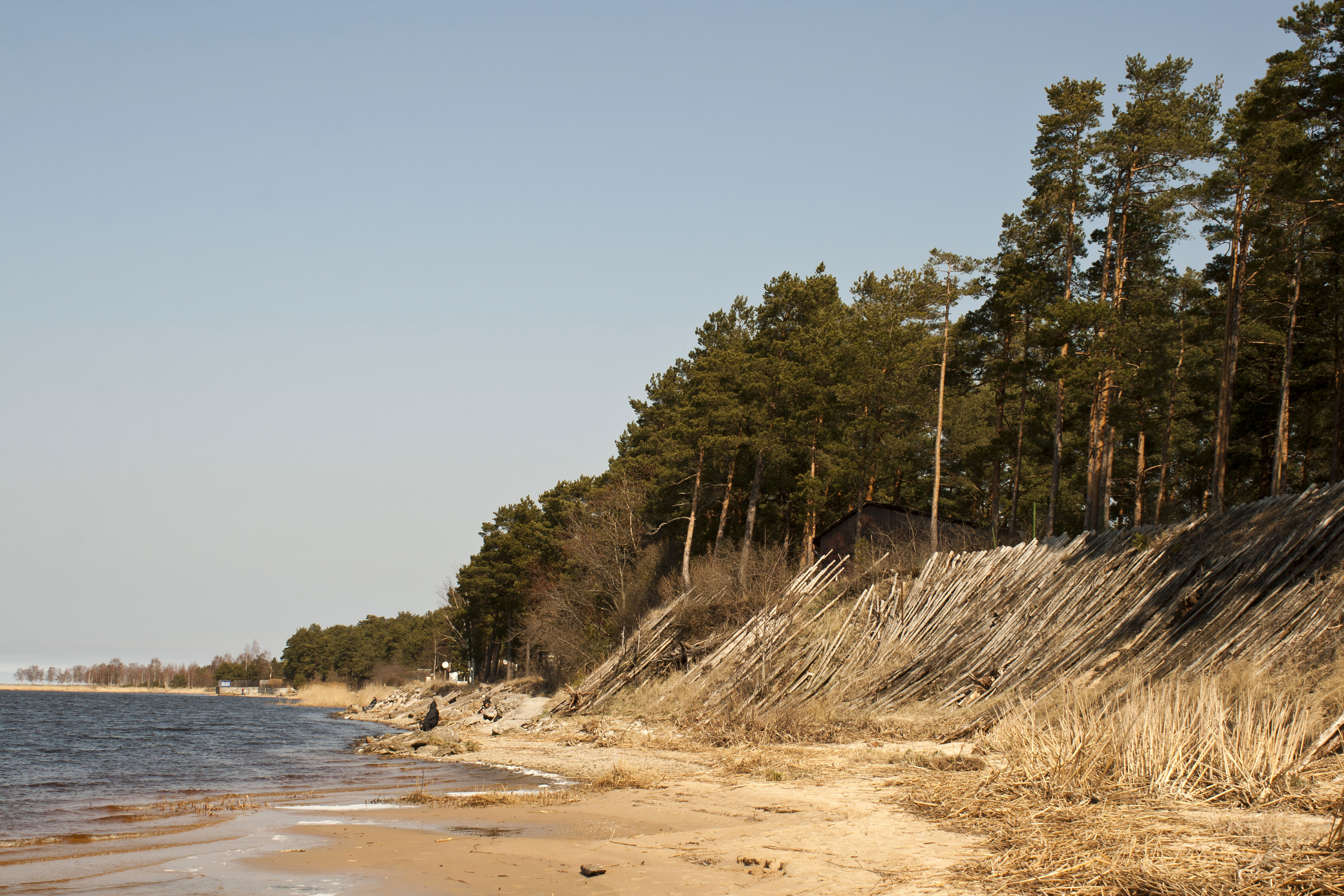 Baltā dune at Vārnukrogs